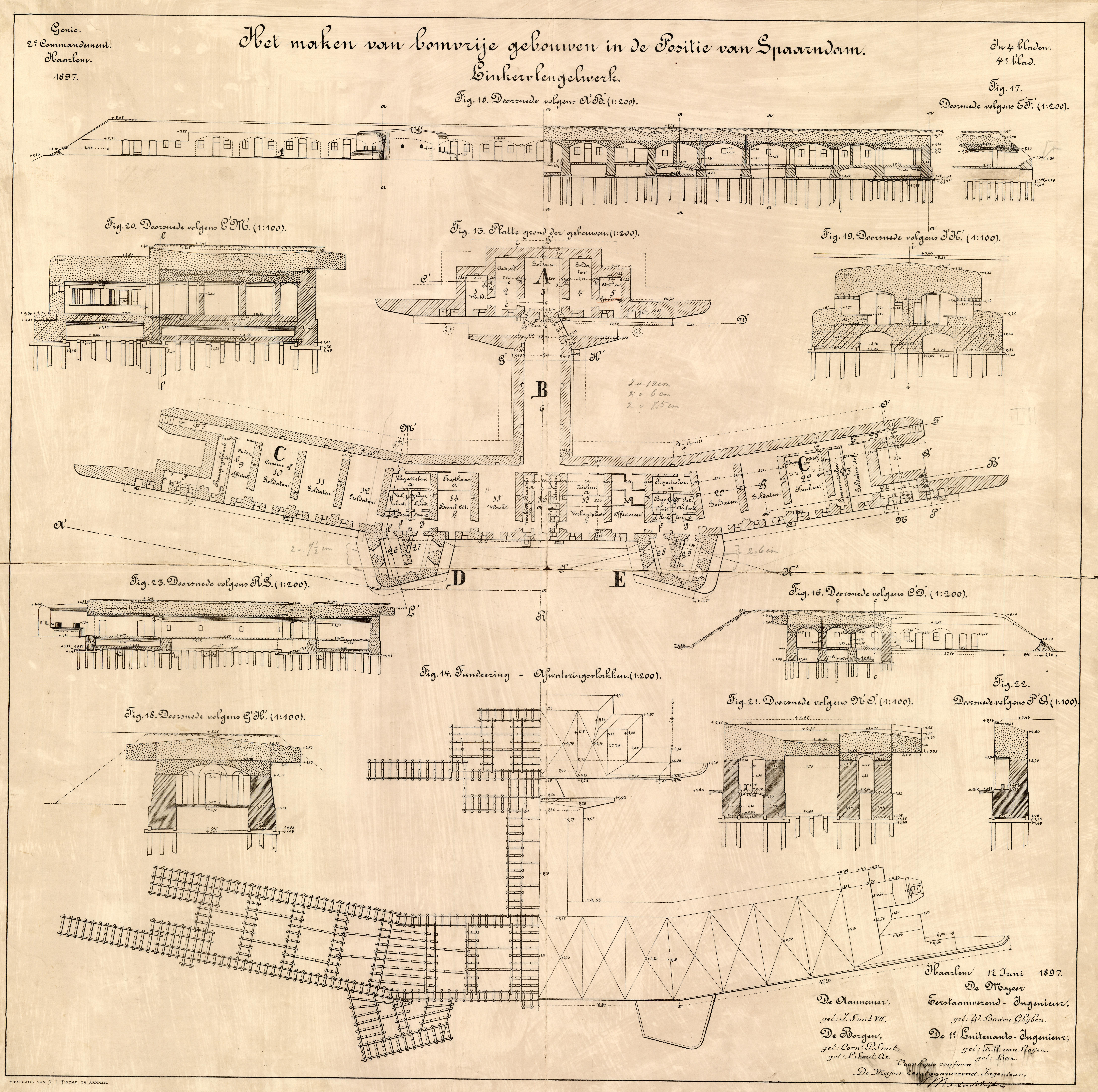 Plattegronden, bouwtekeningen en doorsneden van bomvrije gebouwen in de positie van Spaarndam. Linkervleugelwerk